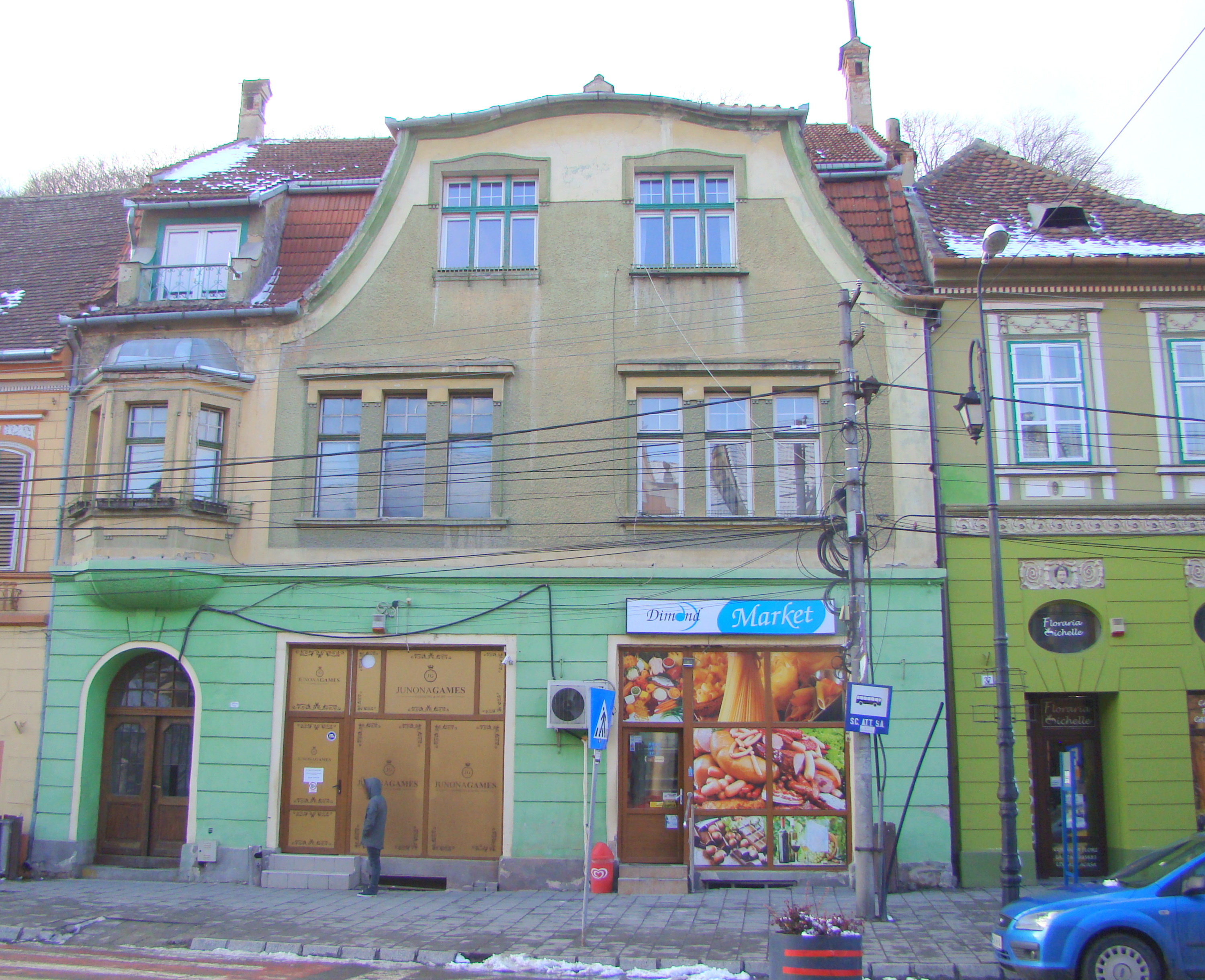 Casă, municipiul Sighișoara, Piața Oberth Hermann 36, sec. XVIII, cca. 1910 - 1920